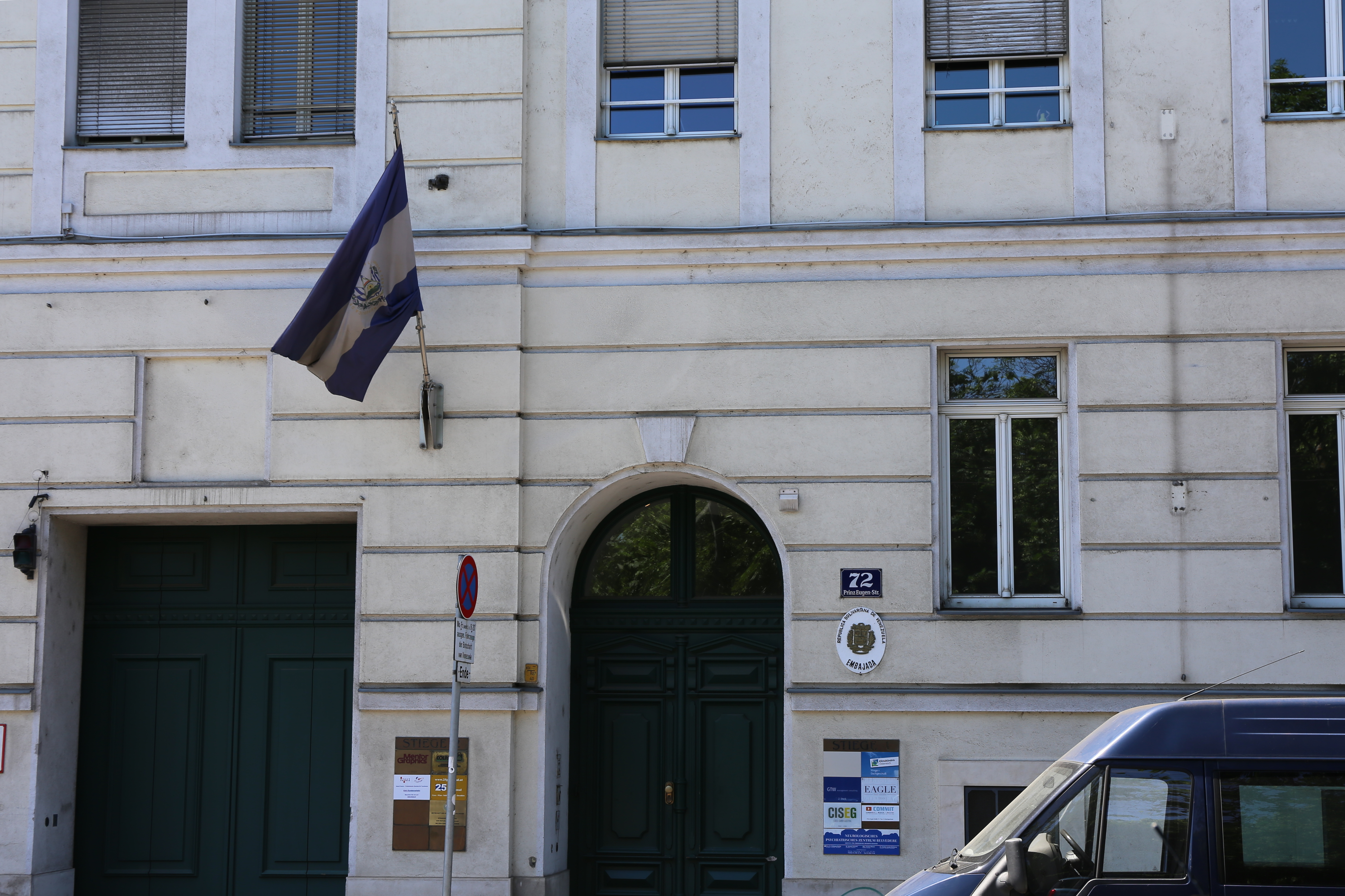 Ambassade du Salvador à Vienne.